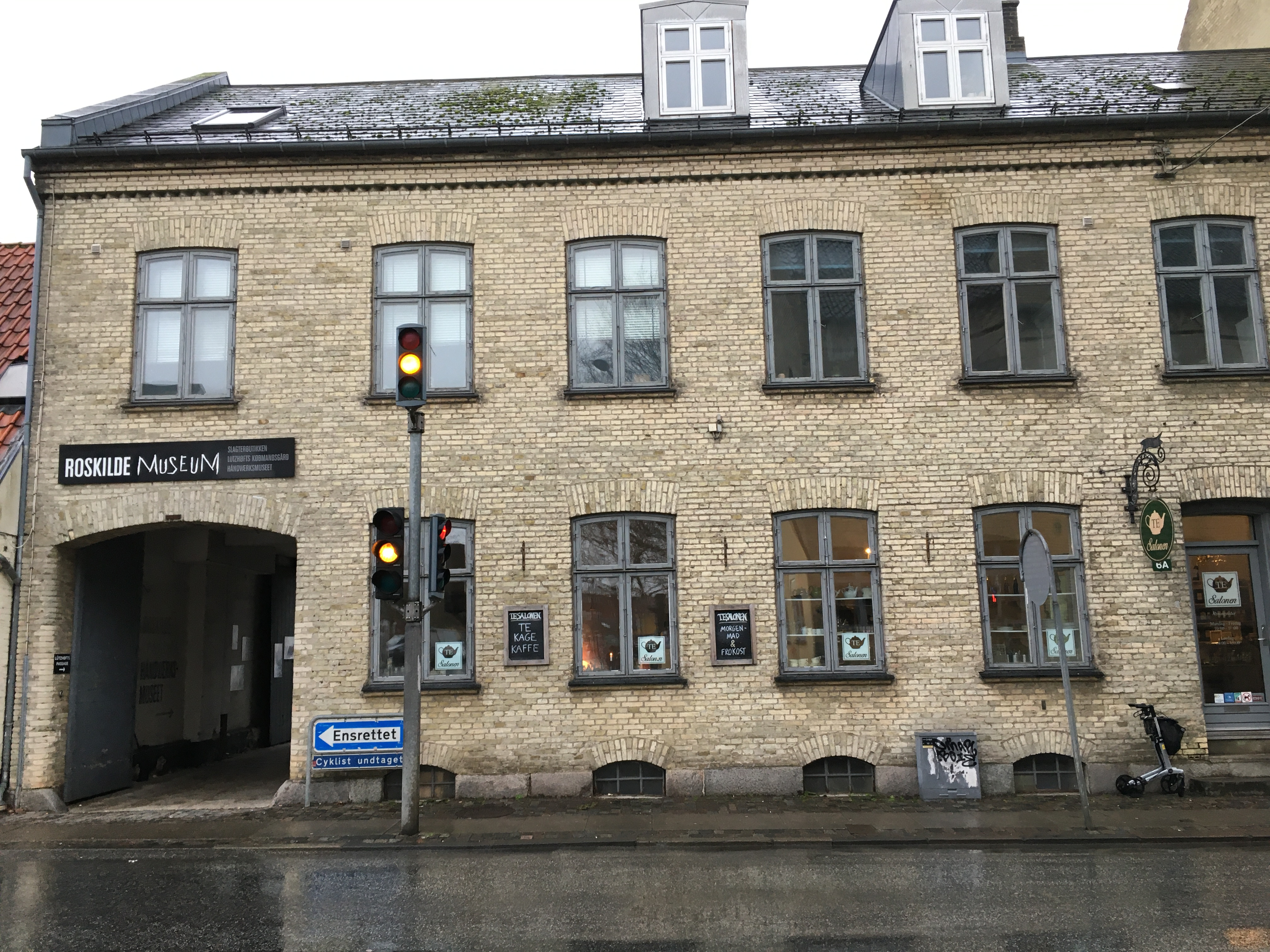 Håndværksmuseet i Roskilde. En del af Roskilde Museum